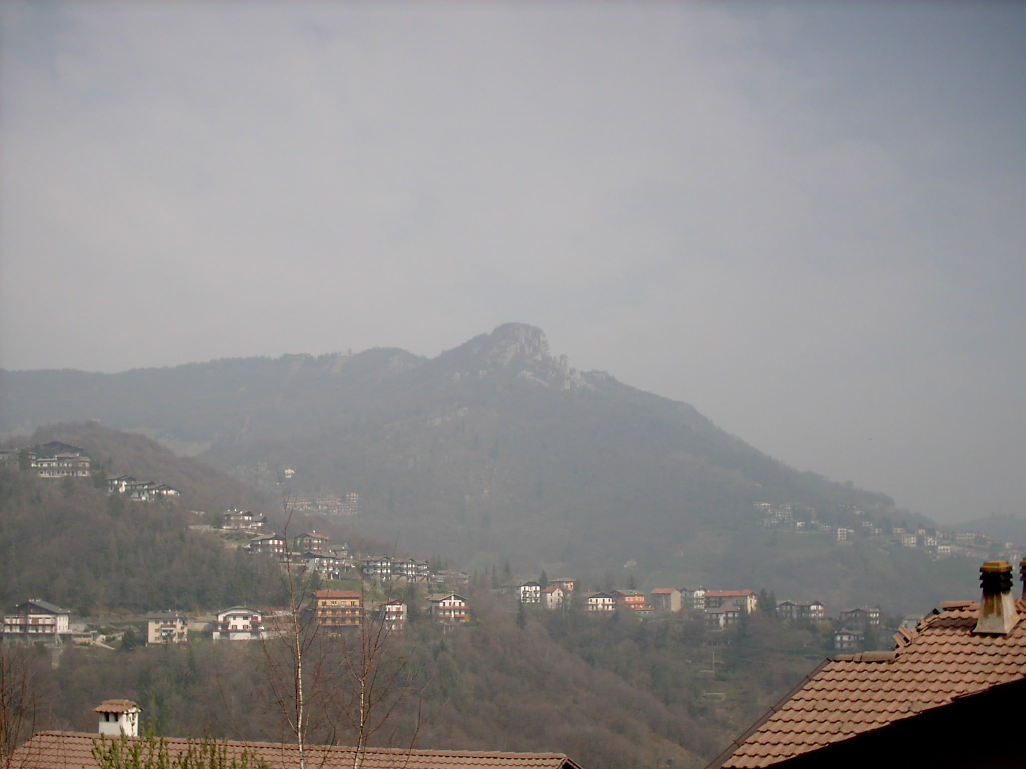 Aviatico, Bergamo, Italia